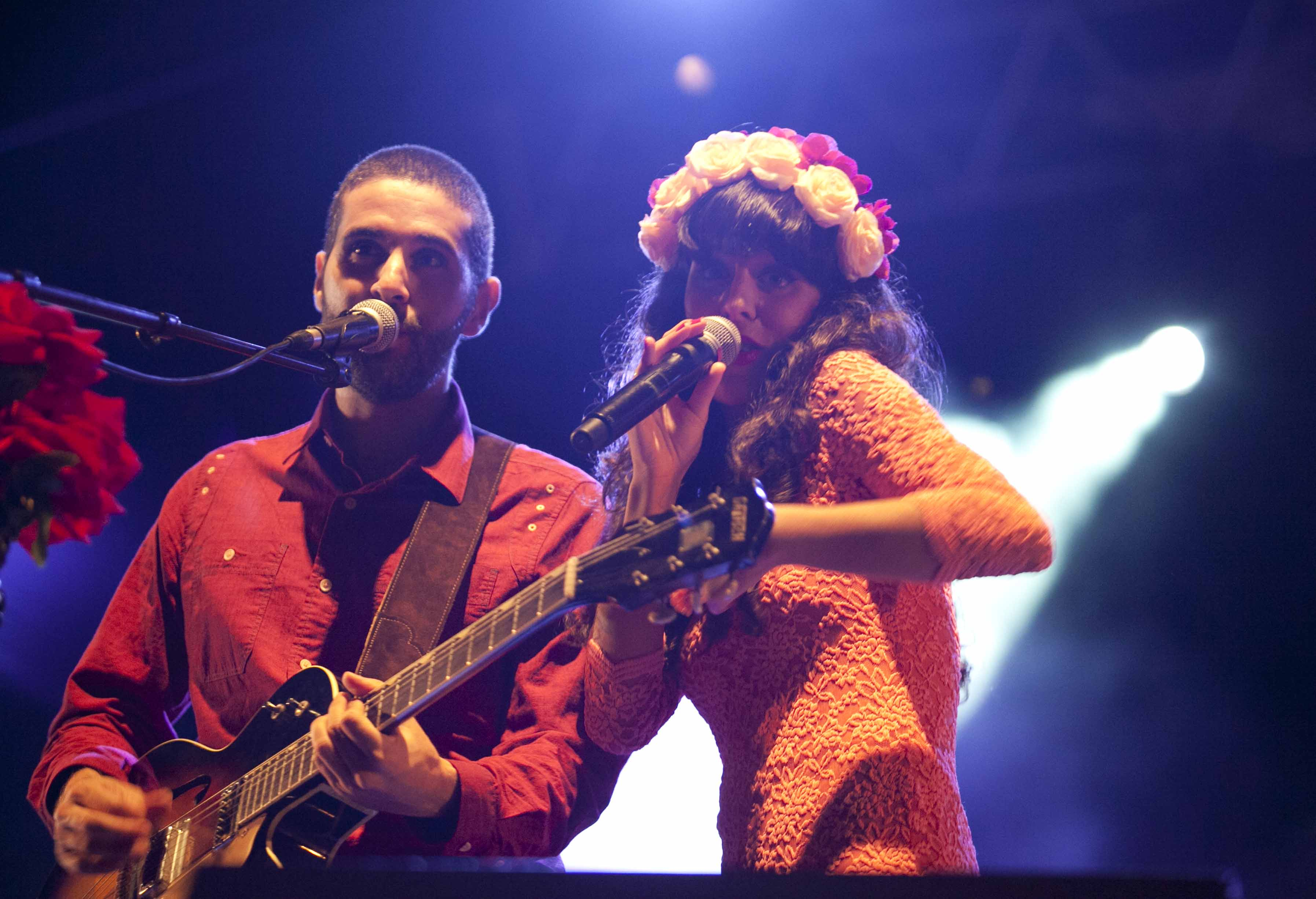 Fuel Fandango en la Semana Grande de San Sebastián de 2012 Argazkilaria / Fotógrafa: Sara Santos